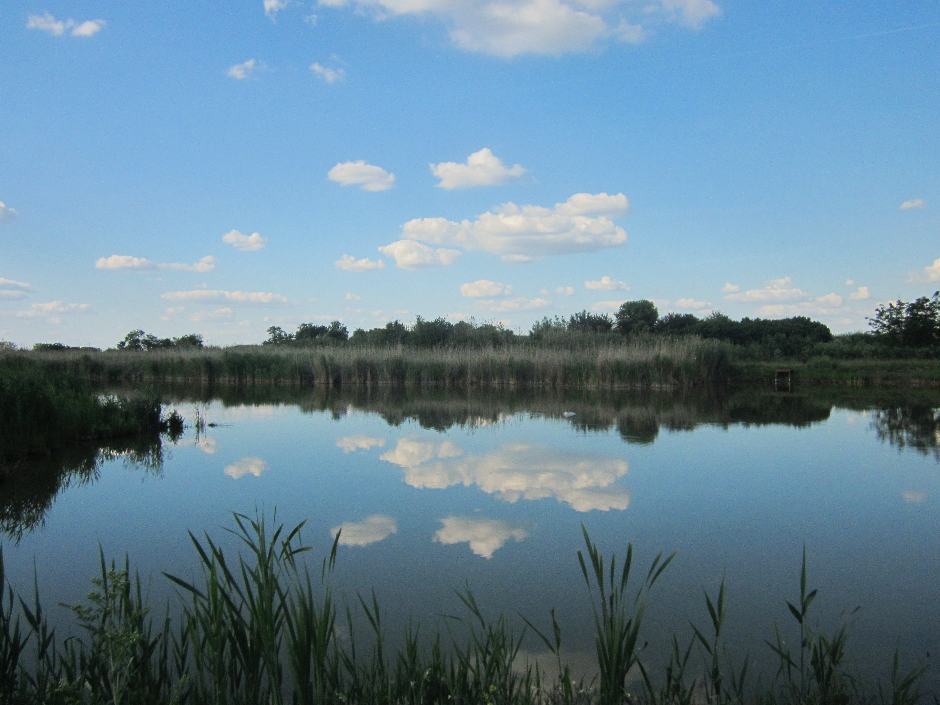 Српски (ћирилица): Ово је фотографија заштићеног природног добра у Србији под шифром: ПП09This is a a photo of a natural area in Serbia with ID: ПП09 Природни парк Бељанска бара, надомак насеља Турија у општини Србобран, Војводина, Србија.